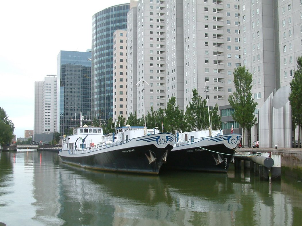 De PRINSES BEATRIX en PRINSES CHRISTINA voor de wal in de Leuvehaven in Rotterdam.